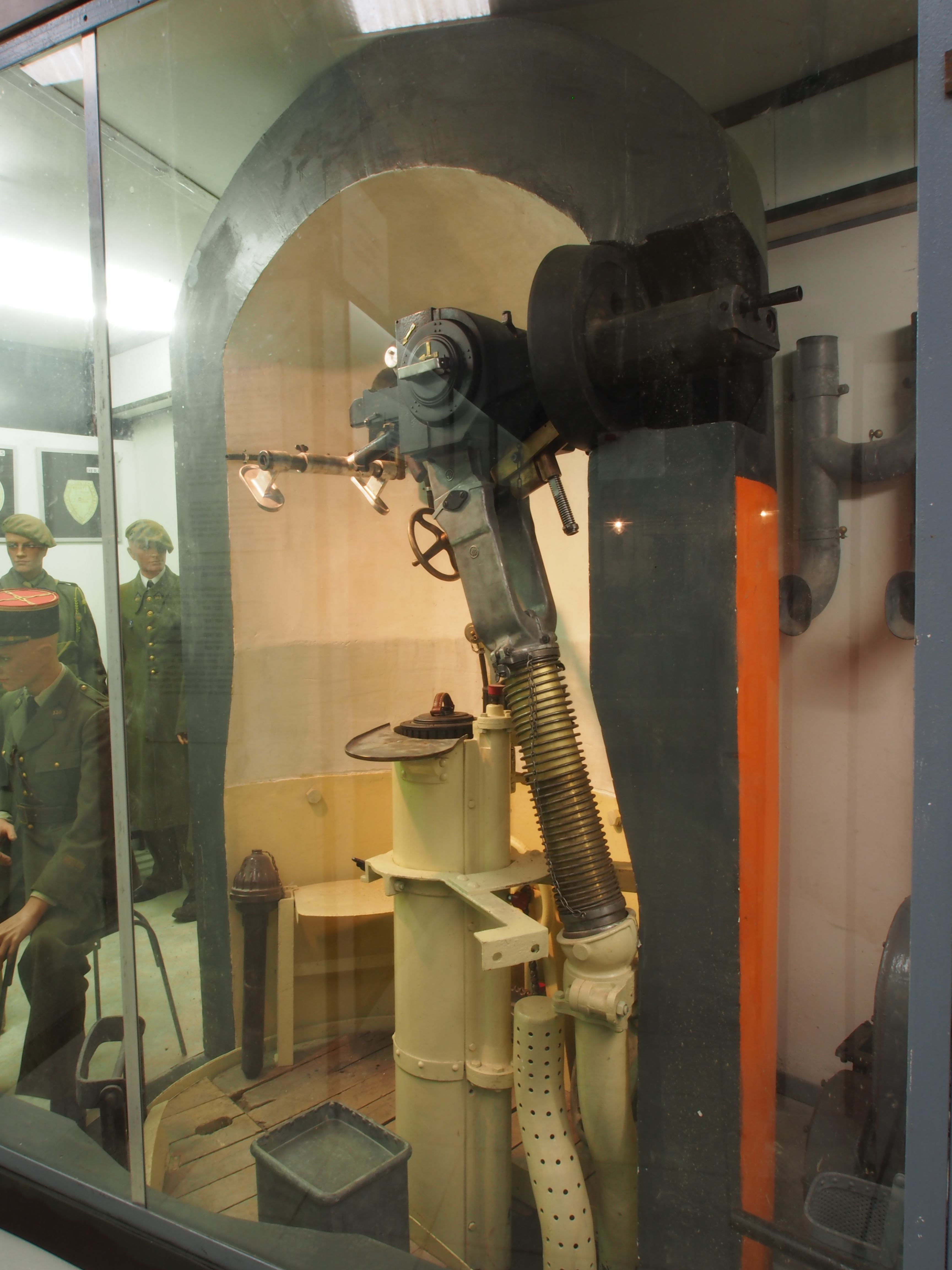 Fort de Fermont and its museum - Firing room view